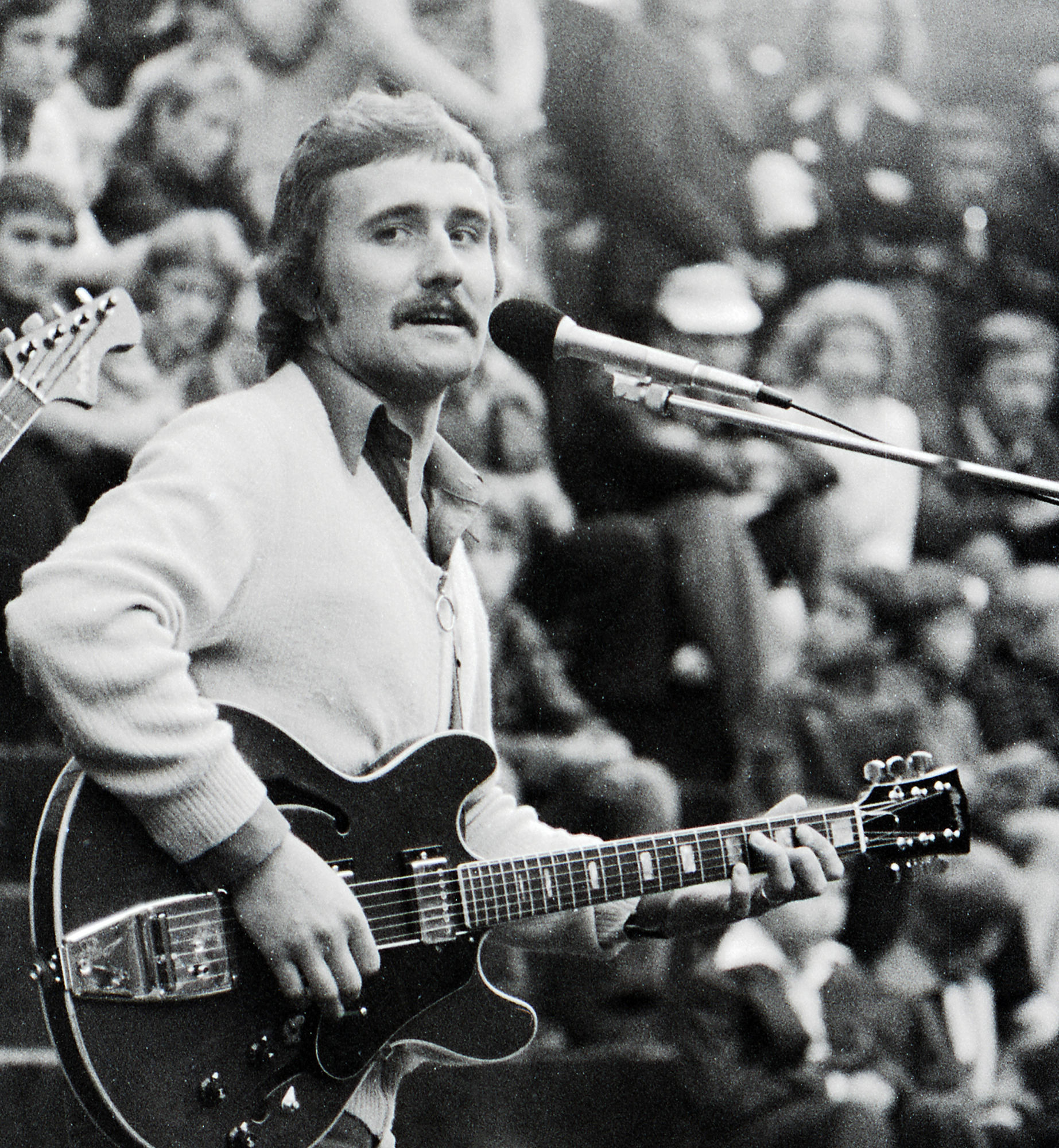 Tarmo Pihlap 1978. aastal esinemas ansambli Palderjan koosseisus.